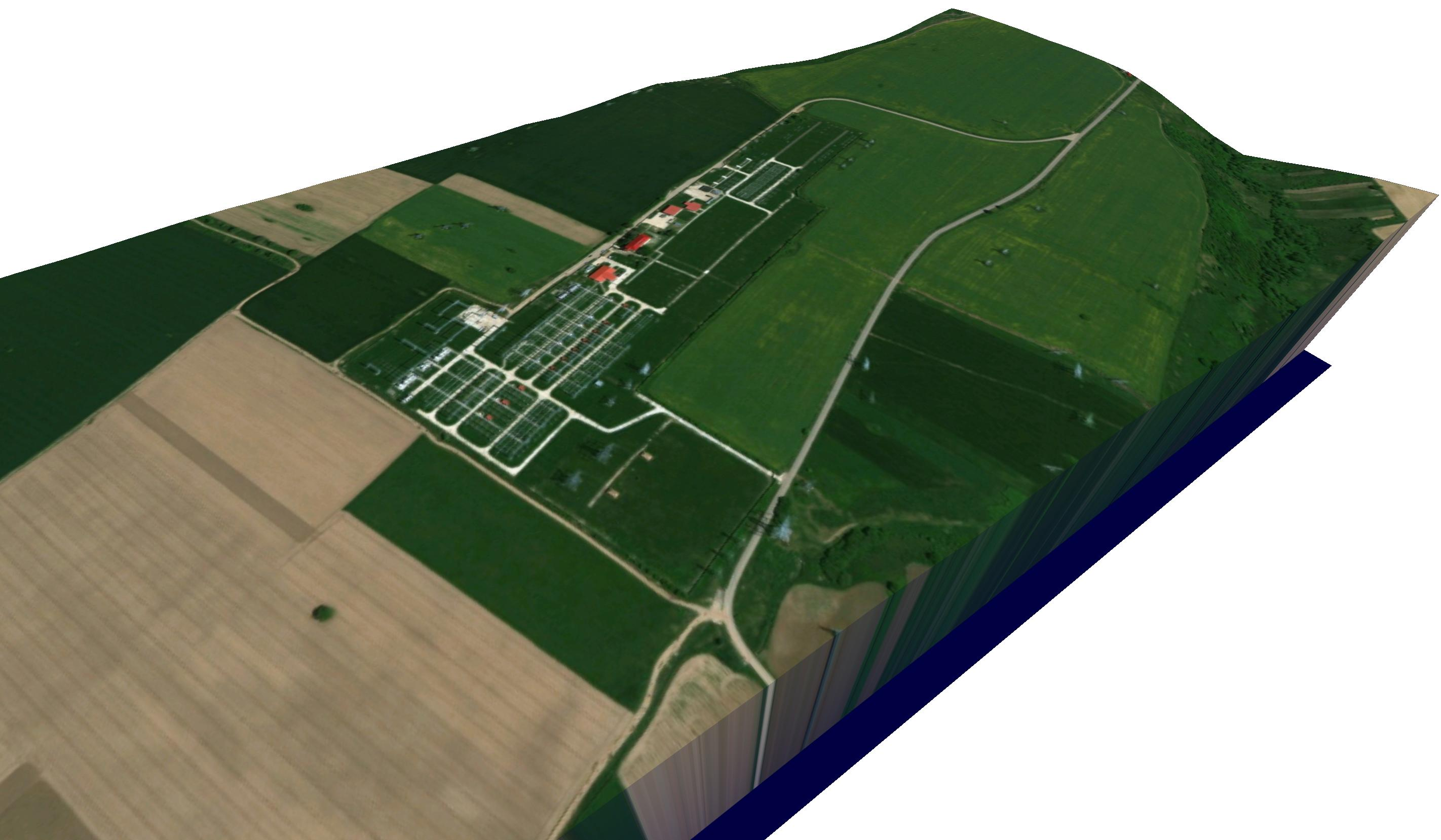 Harta și modelare SRTM cu Stația electrică de transformare 400/220/110 kV Gutinaș, Bacău.